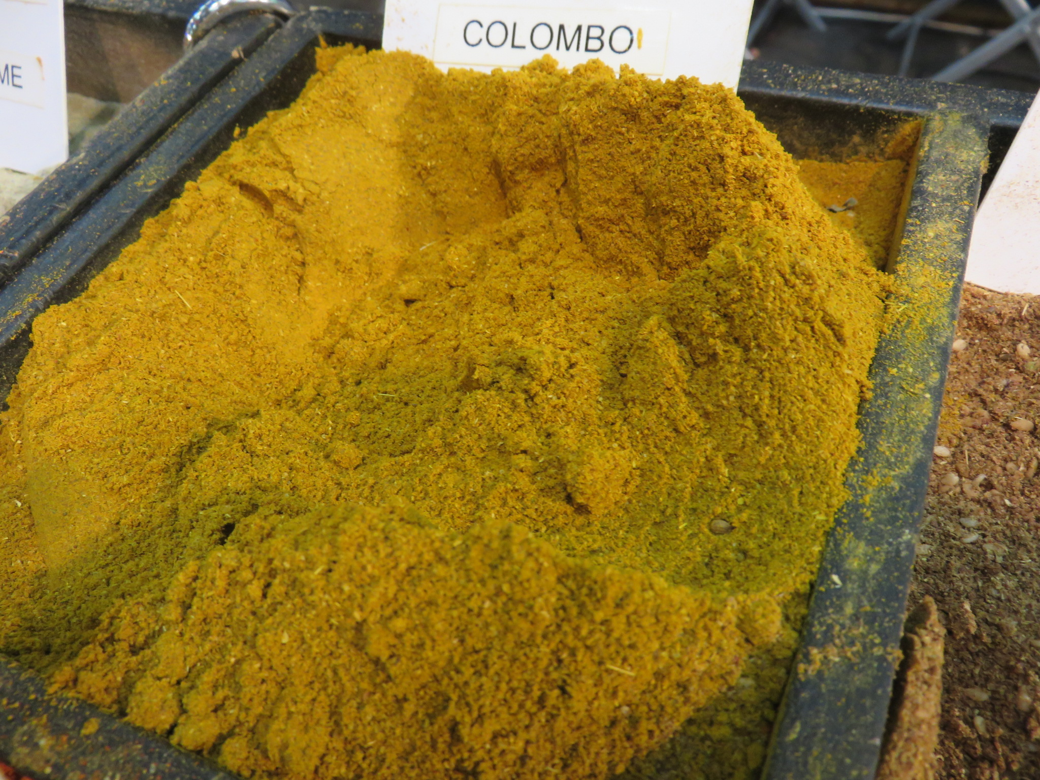 Epice colombo